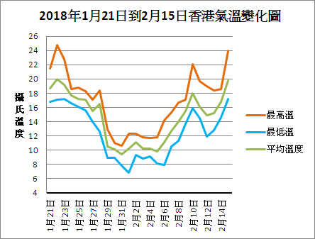 依據香港天文台觀測資料使用Excel軟體繪製香港氣溫變化圖。 觀測資料來源：